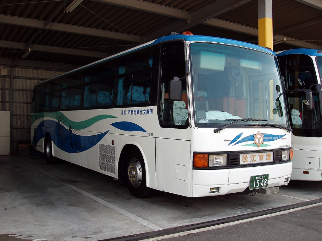 事業者: 松江市交通局 陸運登録: 島根22き15-48 シャーシ: 三菱ふそう U-MS729S 車体: 三菱自動車工業名古屋製作所 年式: 1992年 撮影場所: 平成町車庫（許可済み）